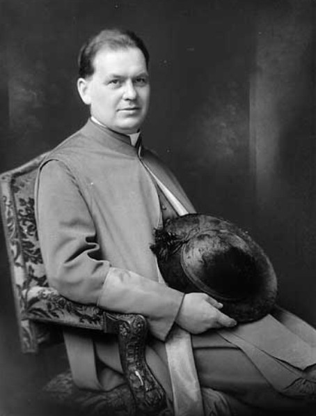 Antonín Bořek-Dohalský (1889–1942), Český šlechtic a katolický kněz.